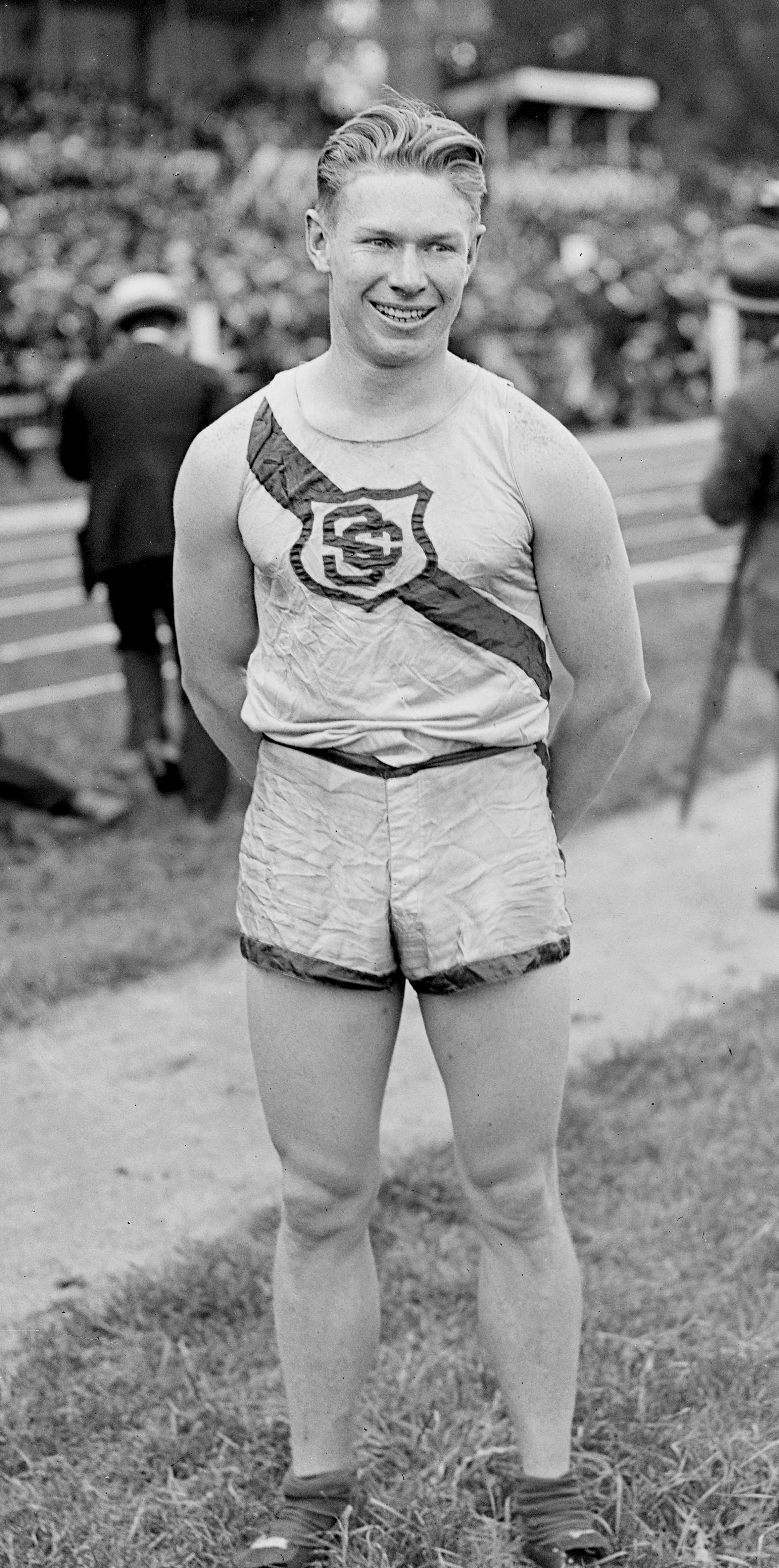 29-8-20, Colombes, portrait de Charles Paddock (Américain) vainqueur du 100 m.